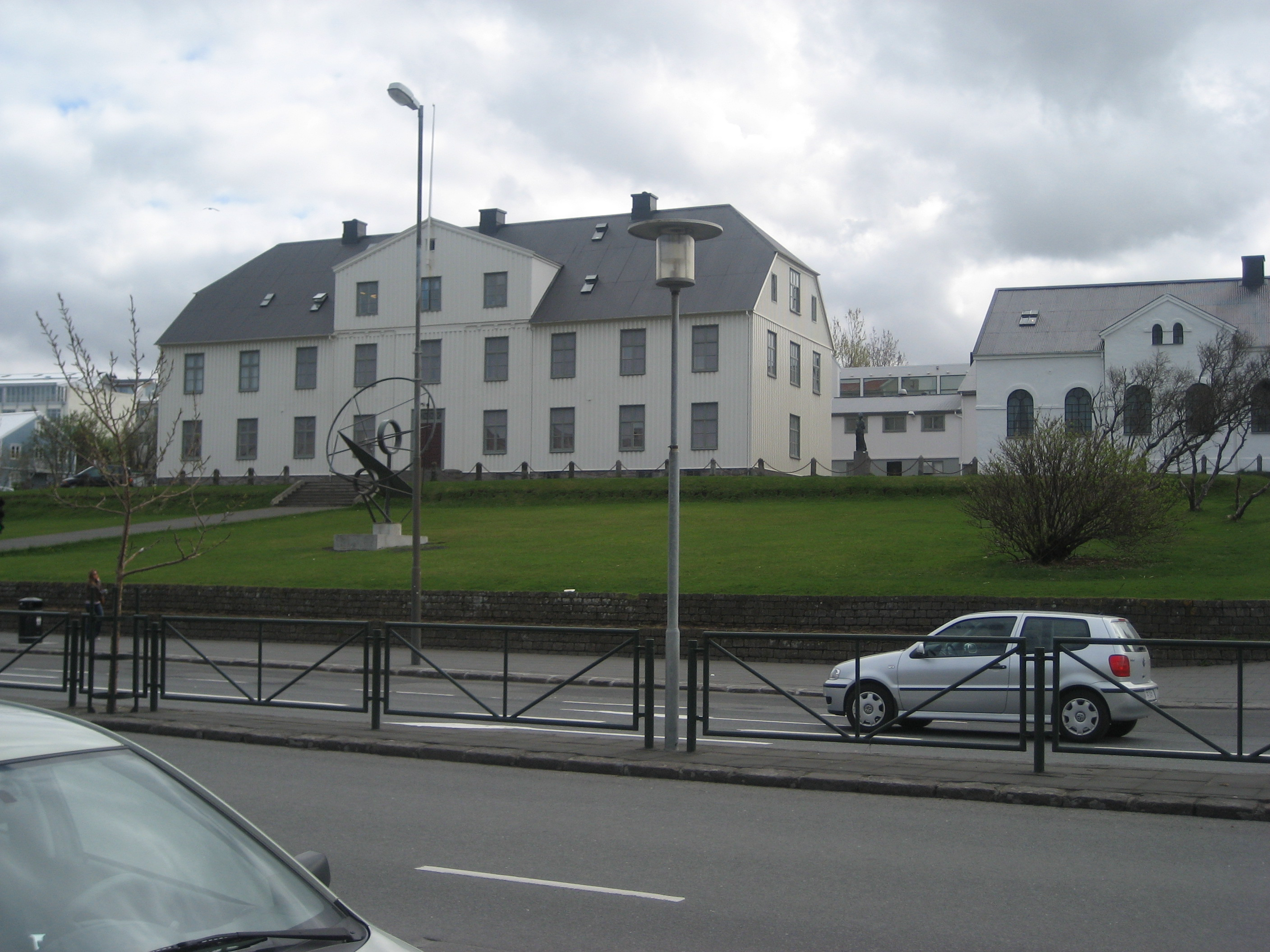 A picture of Menntaskólin í Reykjavík